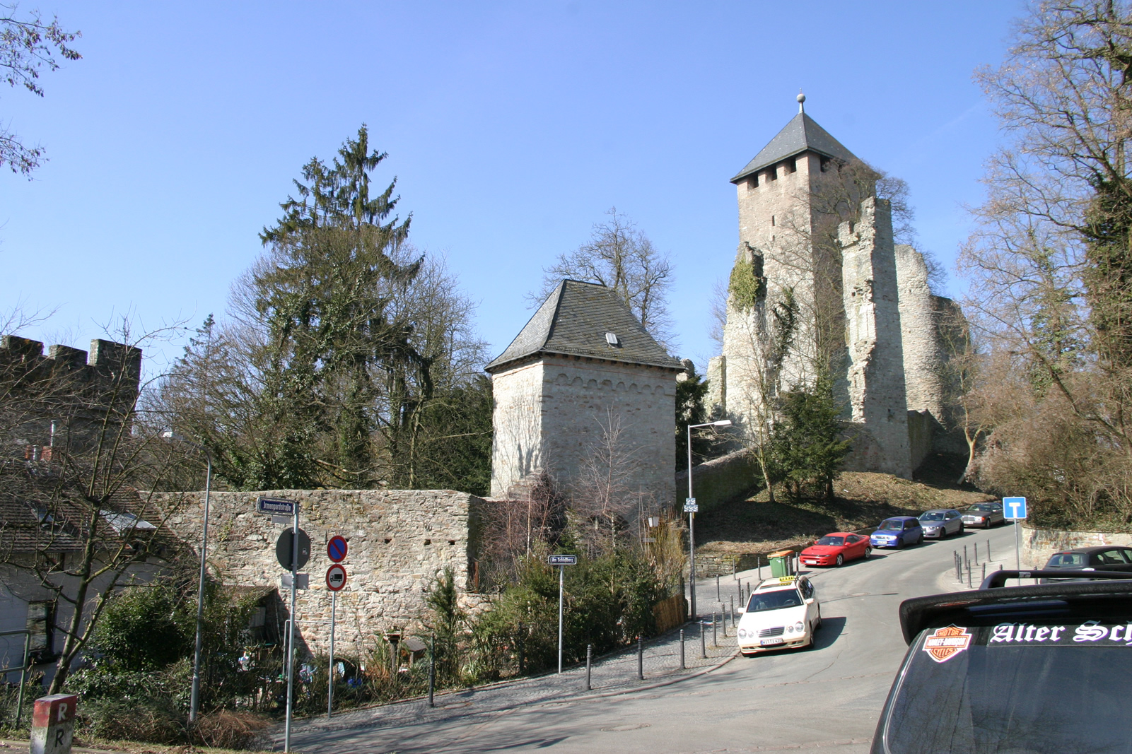 Wiesbaden, Burg Sonnenberg, selbst fotografiert